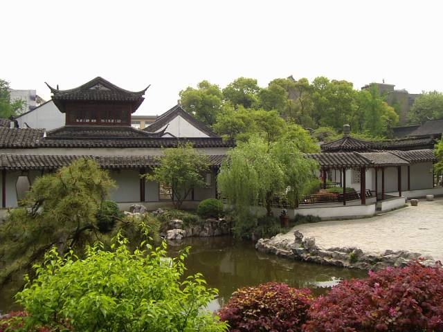 南京瞻园 瞻園・太平天国歴史博物館 2004年4月15日撮影 撮影者：権作